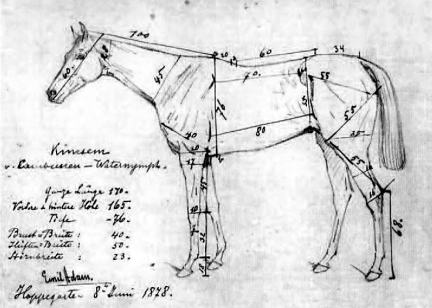 Kincsem a csodakanca méretei, Emil Adam festőművész vázlatrajza